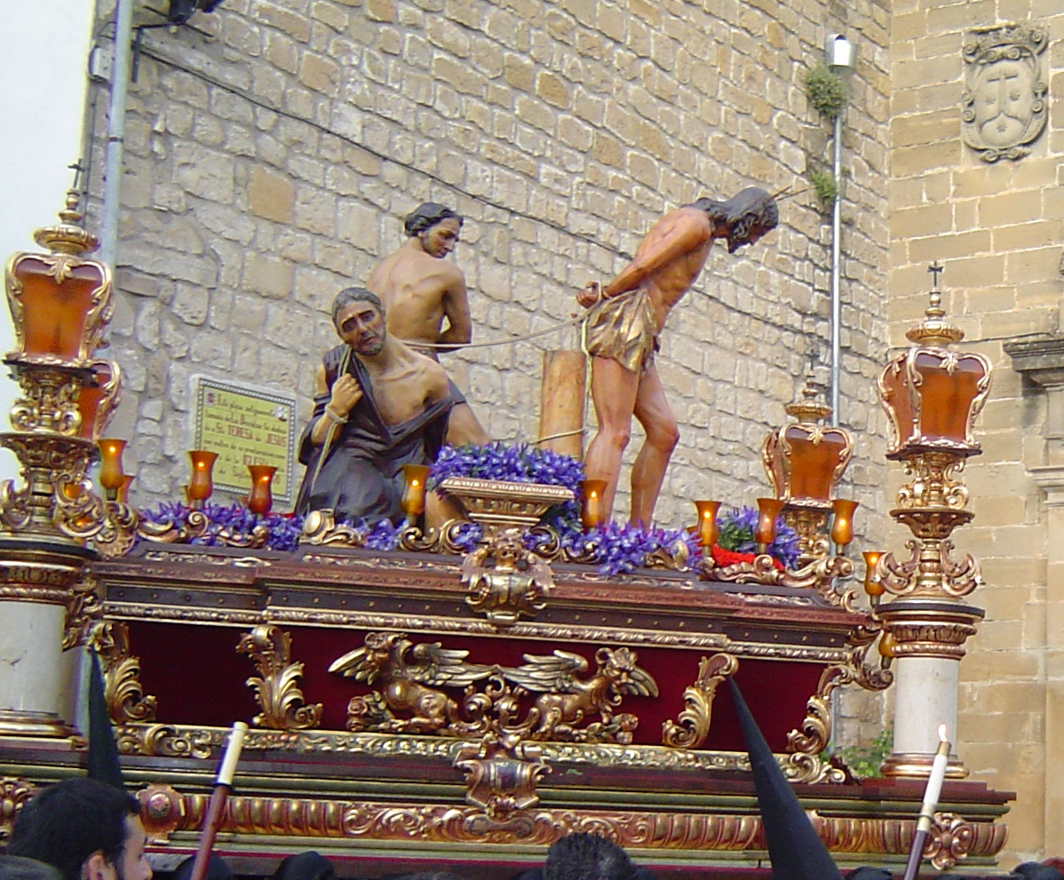 Imagen de Nuestro Señor en la Columna procesionando por las calles de Úbeda, en Jaén (España)